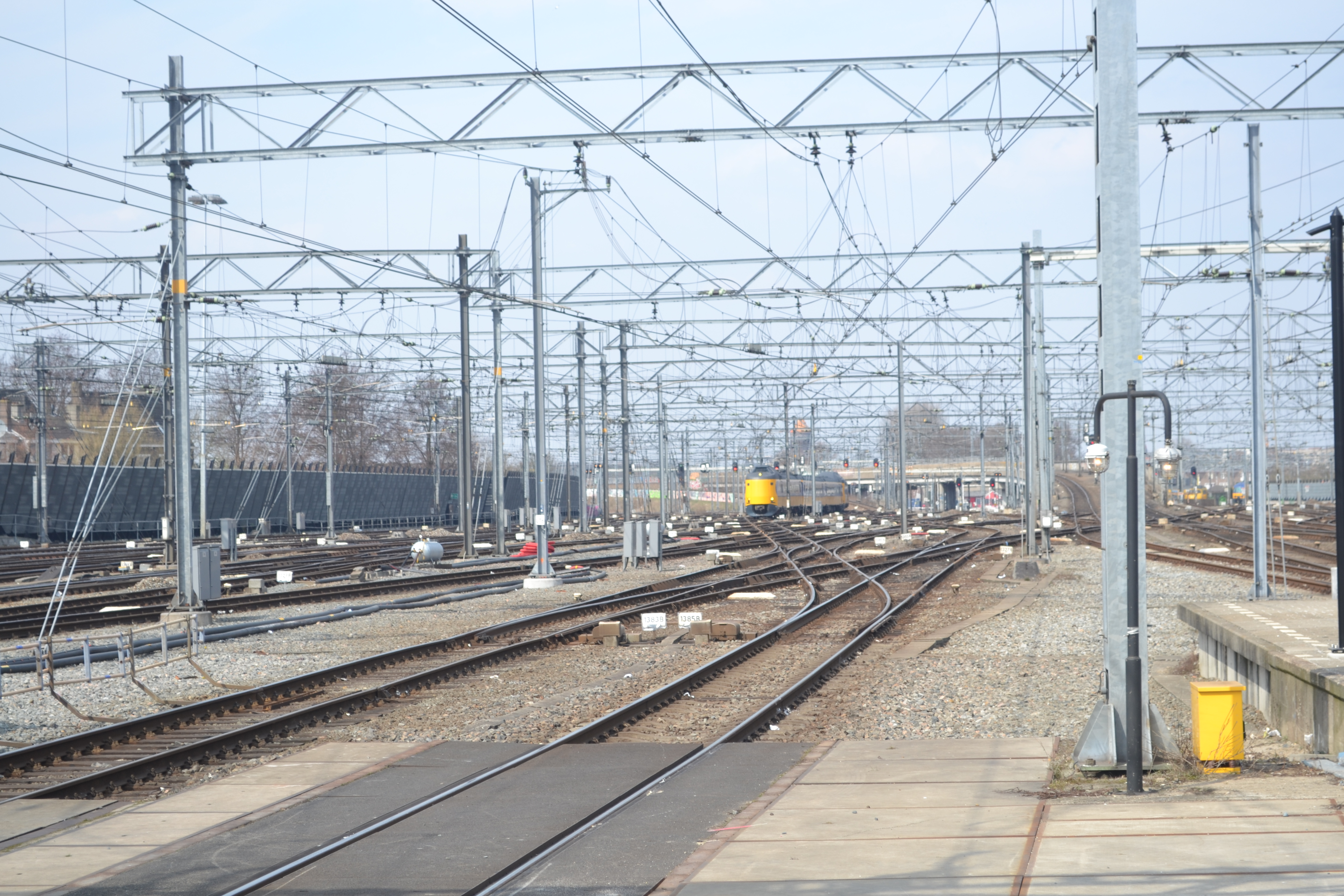 Het sporenplan ten noorden van Utrecht Centraal anno 2013. Tussen nu en 2016 worden vrijwel alle wissels hier gesaneerd.